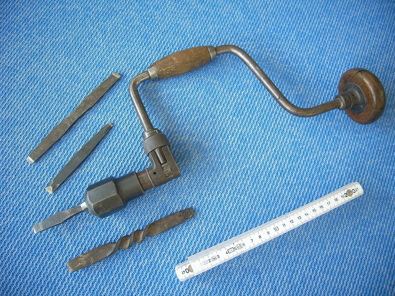 Bohrwinde und Schraubendreherklinge